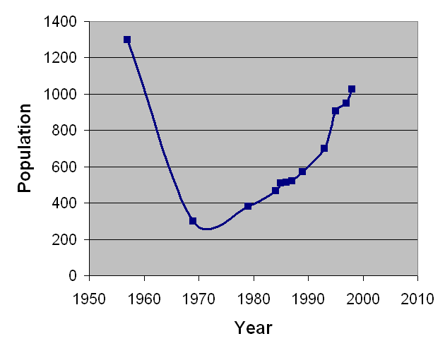 Rikbaktsa population chart.